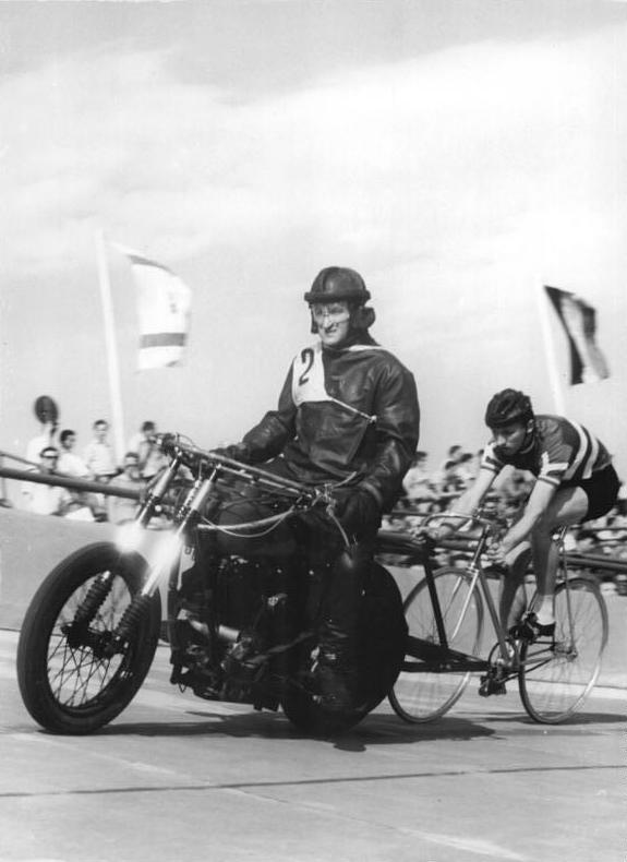 Schondorf, Siegfried Köhler Zentralbild Wendorf 26.5.1958 Wen-Ku Saison-Eröffnung auf der Radrennbahn in Berlin-Weissensee Am 26. Mai 1958 wurden auf der Radrennbahn in Berlin-Weissensee der Grosse Frühlingspreis, ein Dauerrennen hinter Motoren und Omnium als Saisonauftakt ausgetragen. UBz:Sieger im ersten Vorlauf über 5 km hinter Motoren wurde Siegfried Köhler (SC Einheit Berlin) hinter Schrittmacher Schondorf.